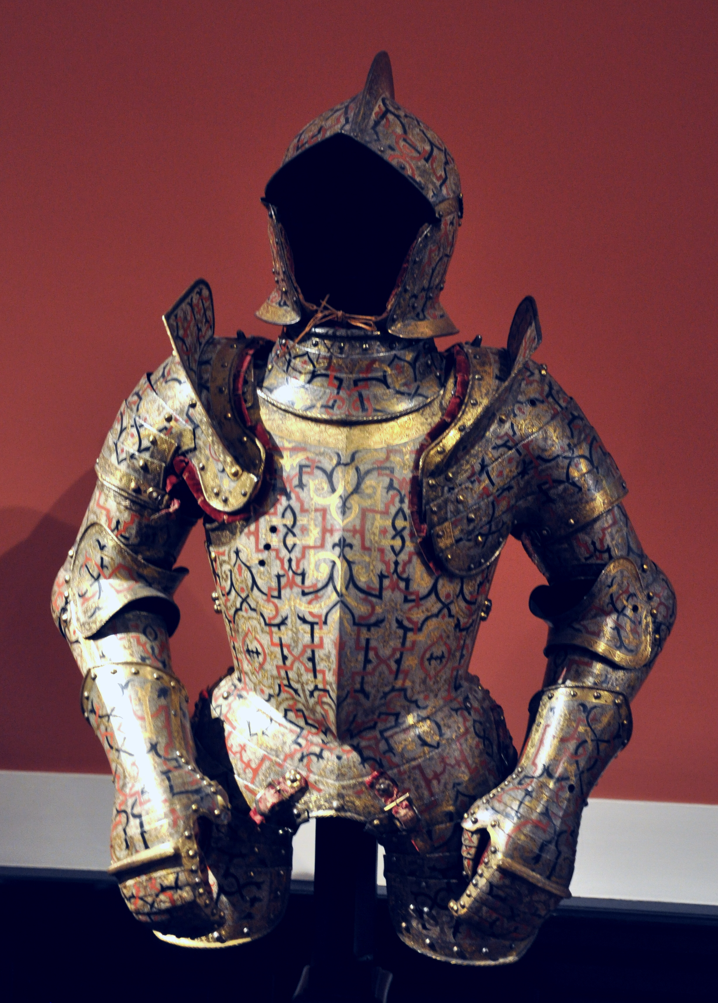 Wien, Kunsthistorisches Museum, Hofjagd- und Rüstkammer (Neue Burg); Inv. Nr. A 1412 Halbharnisch aus einer Garnitur; Nikolaus IV. "der Schwarze" Radziwill, Großmarschall von Litauen (1515–1565) von Kunz Lochner, Nürnberg um 1555; Dekor von anonymem Ätzmaler